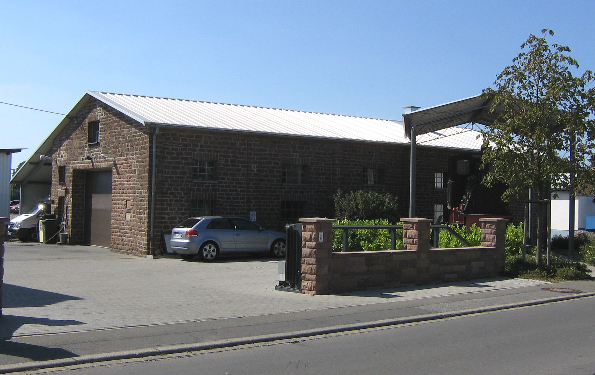 Binsfeld, ehemaliger Lokschuppen der Kleinbahn Philippsheim - Binsfeld